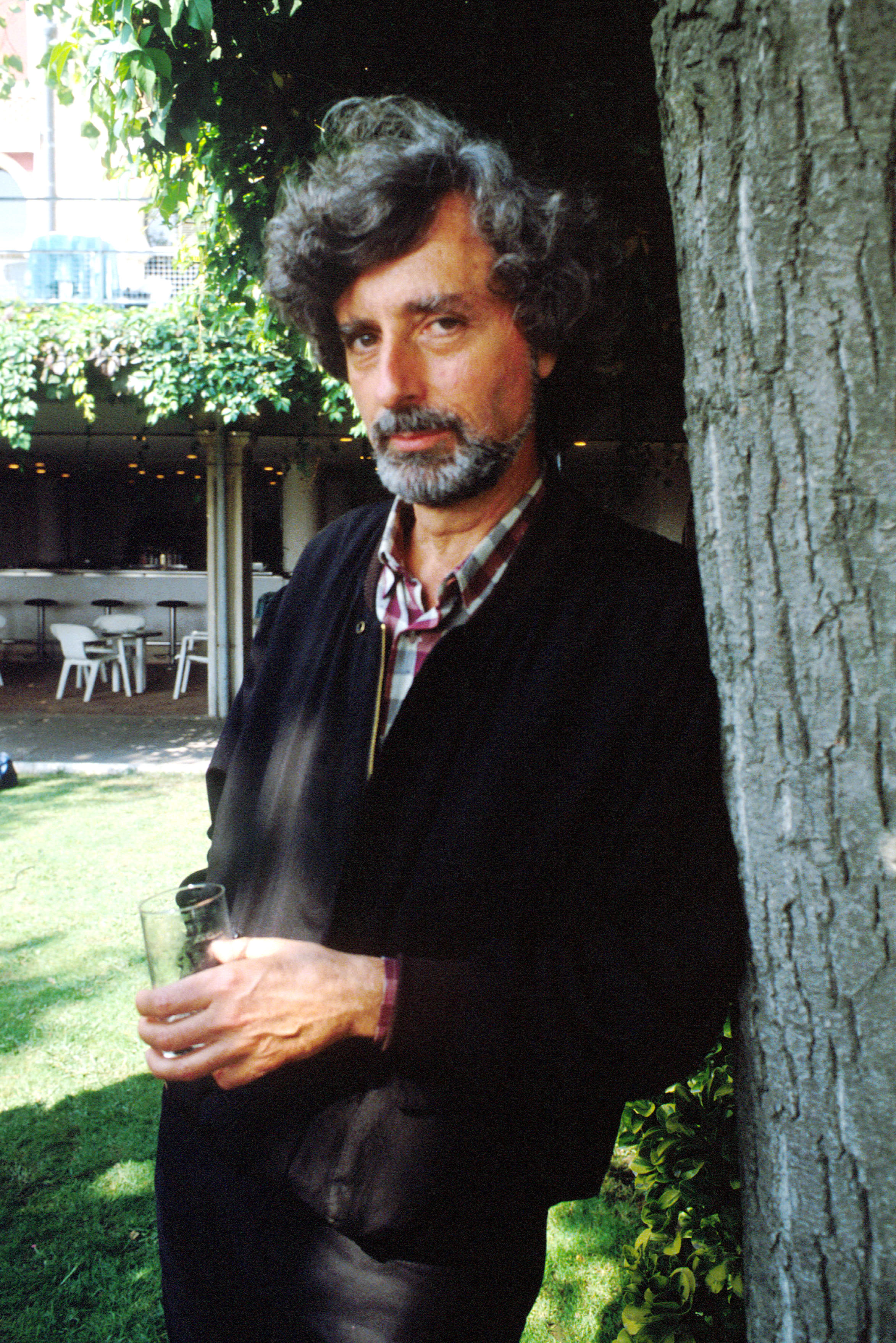 Il regista statunitense Philip Kaufman alla Mostra del Cinema di Venezia del 1991